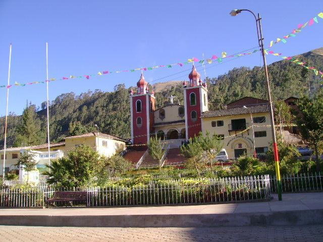 Imagen de uranmarca